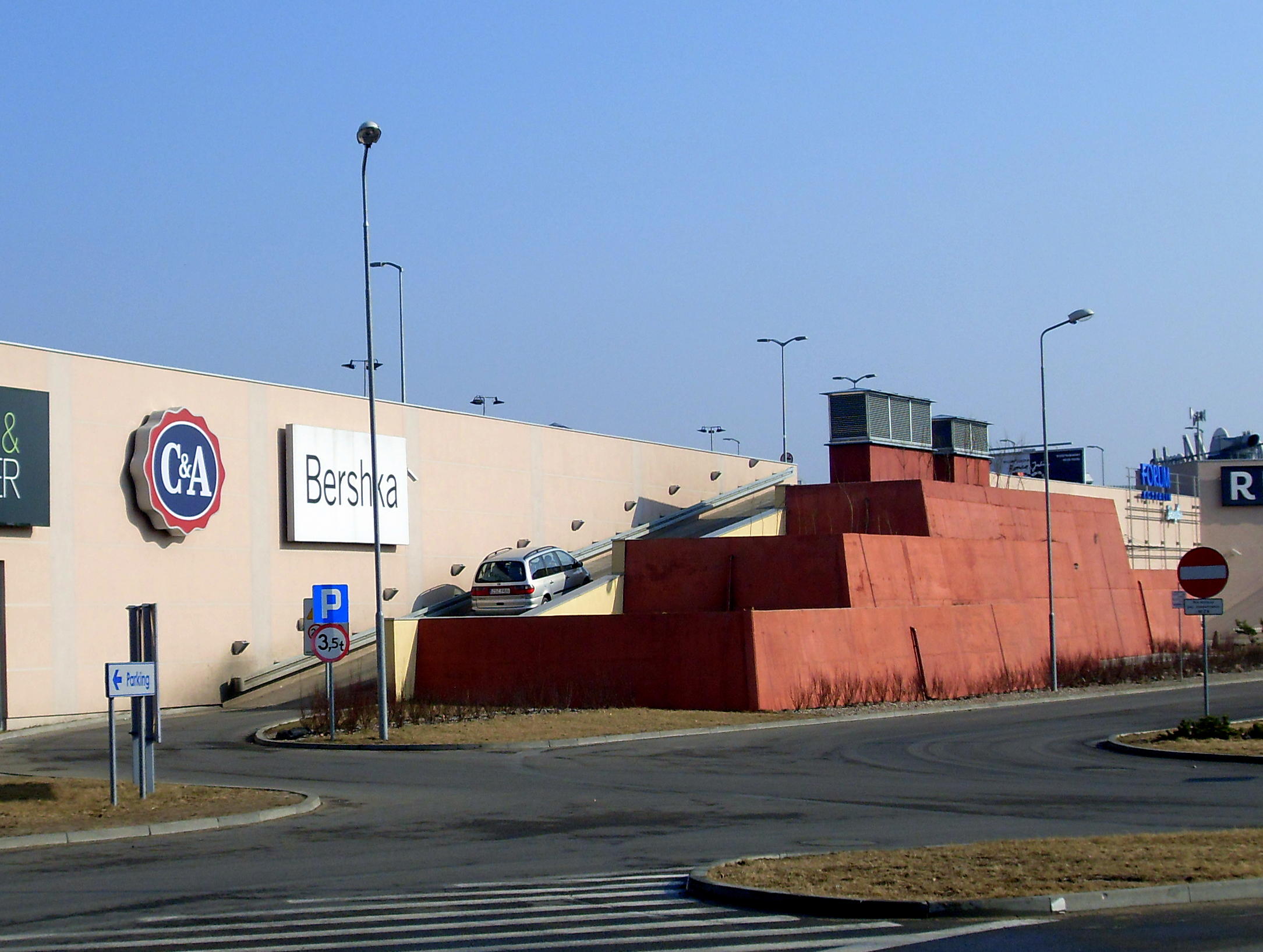 Podjazd (pochylnia) na garaż na centrum handlowe FORUM KOSZALIN w Koszalinie (zachodniopomorskie).